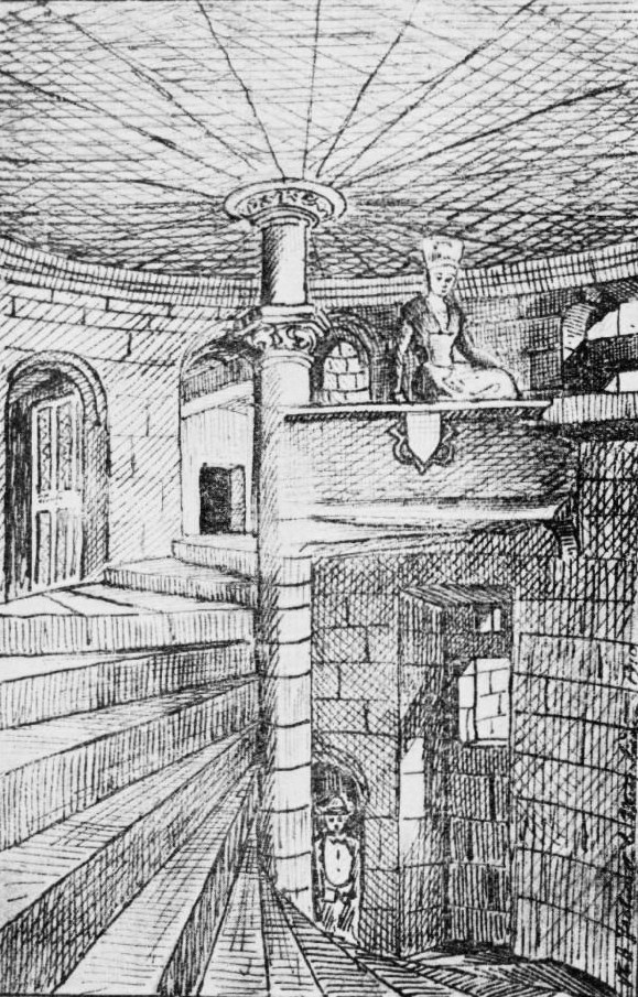 L'escalier du manoir de Mézarnou (dessin de 1905, J. Baudry, "La Fontenelle le ligueur et le brigandage en Basse-Bretagne pendant la Ligue